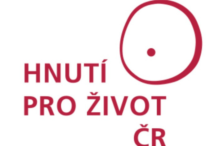 logo Hnutí Pro život ČR